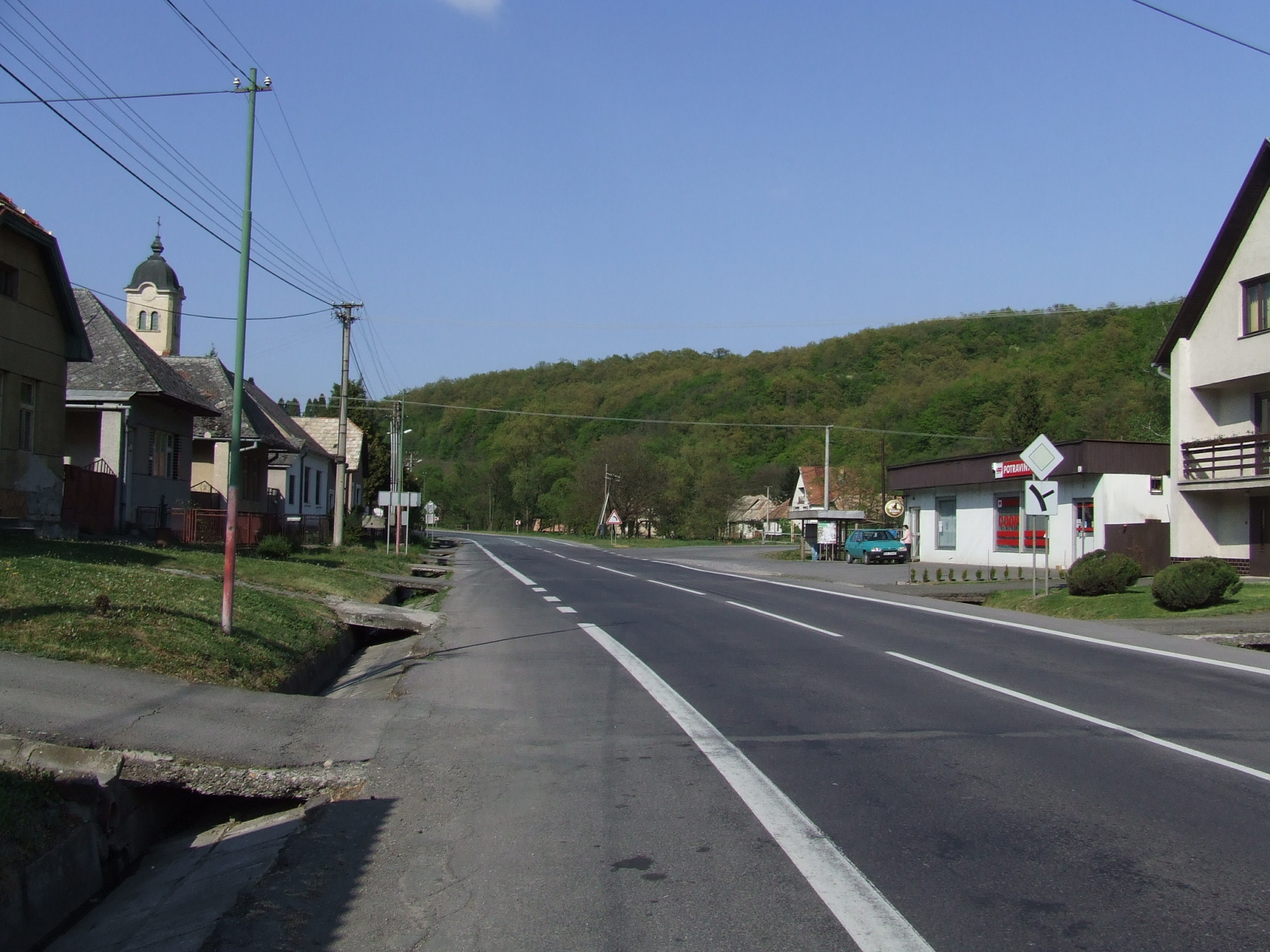 Village of Domaniky, okres Krupina, Slovakia